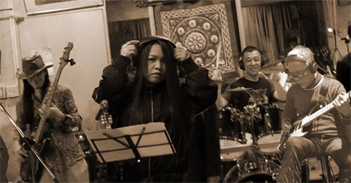 モンカトンク・メンバー